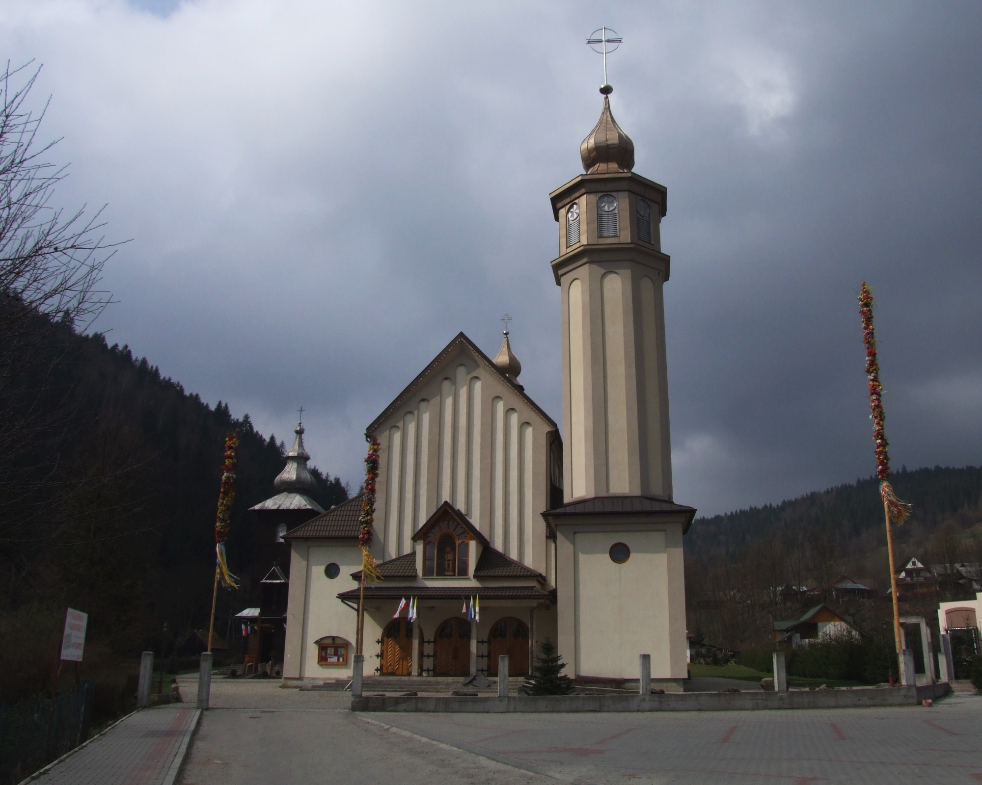 Kościół w Szczawie